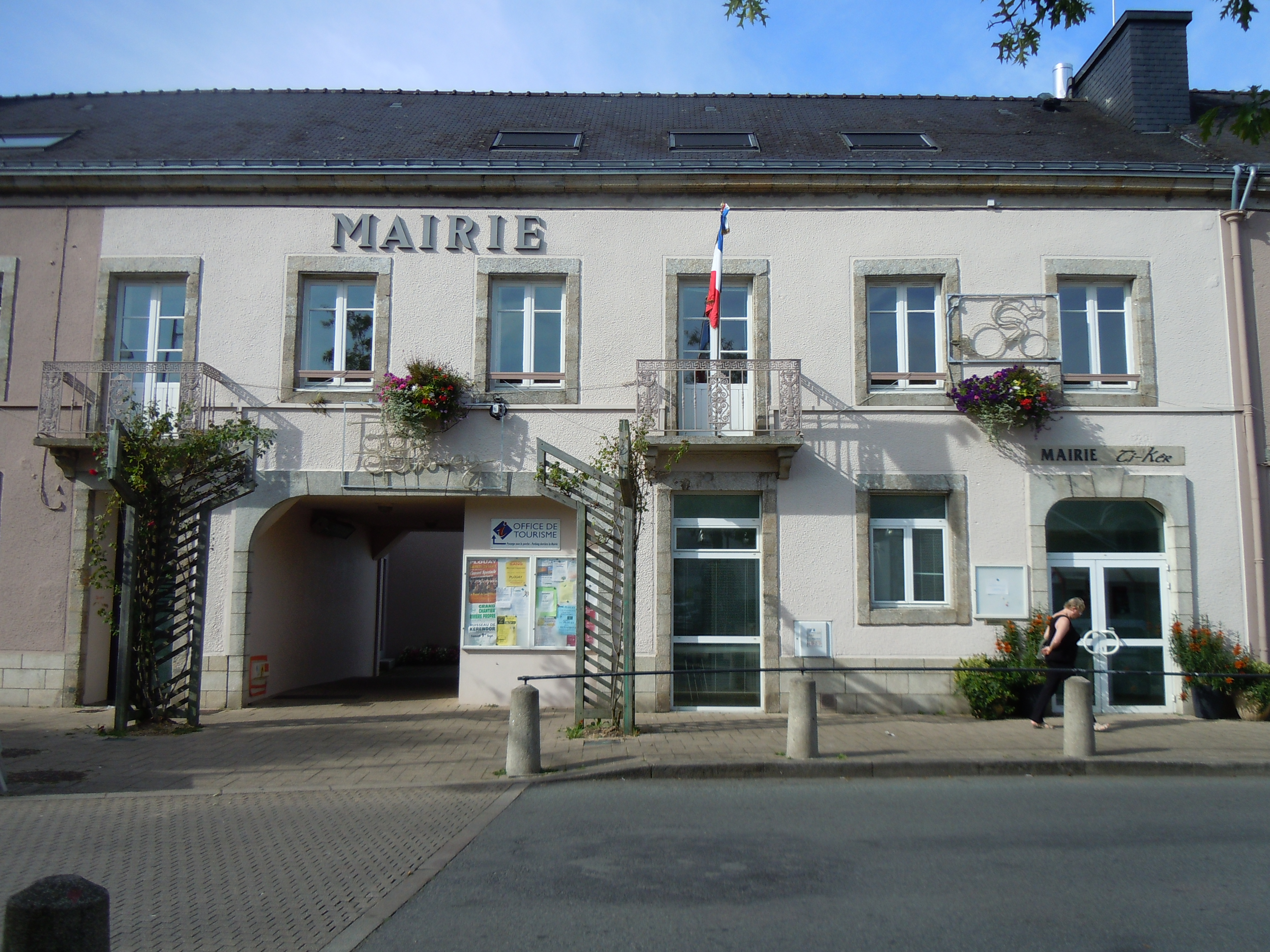 la mairie de Plouay (département du Morbihan)